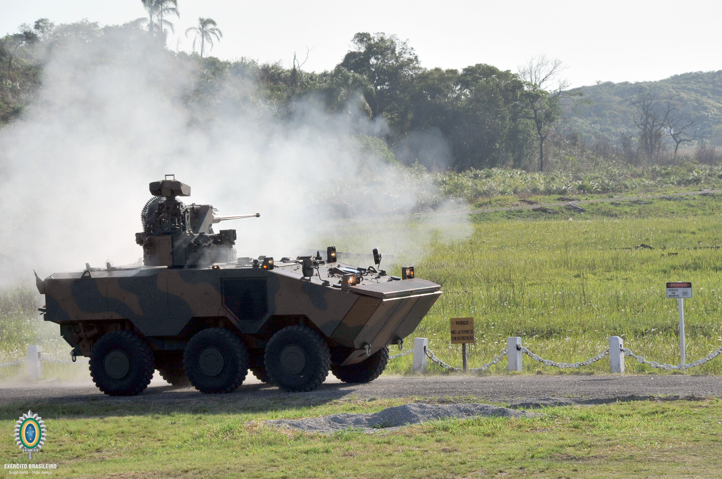 Cavalaria